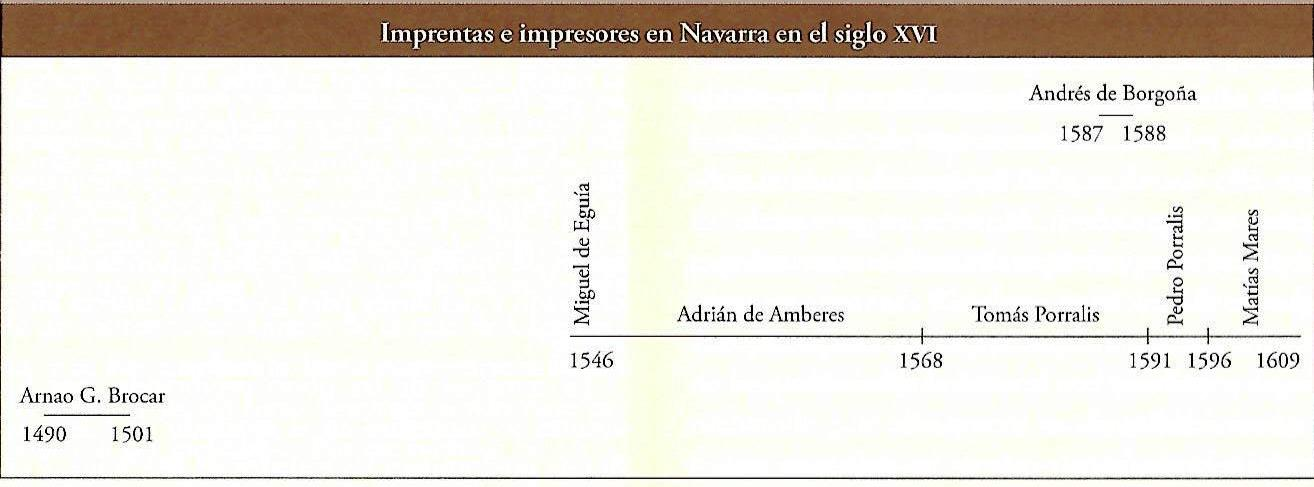 Imprentas navarras en el siglo XVI